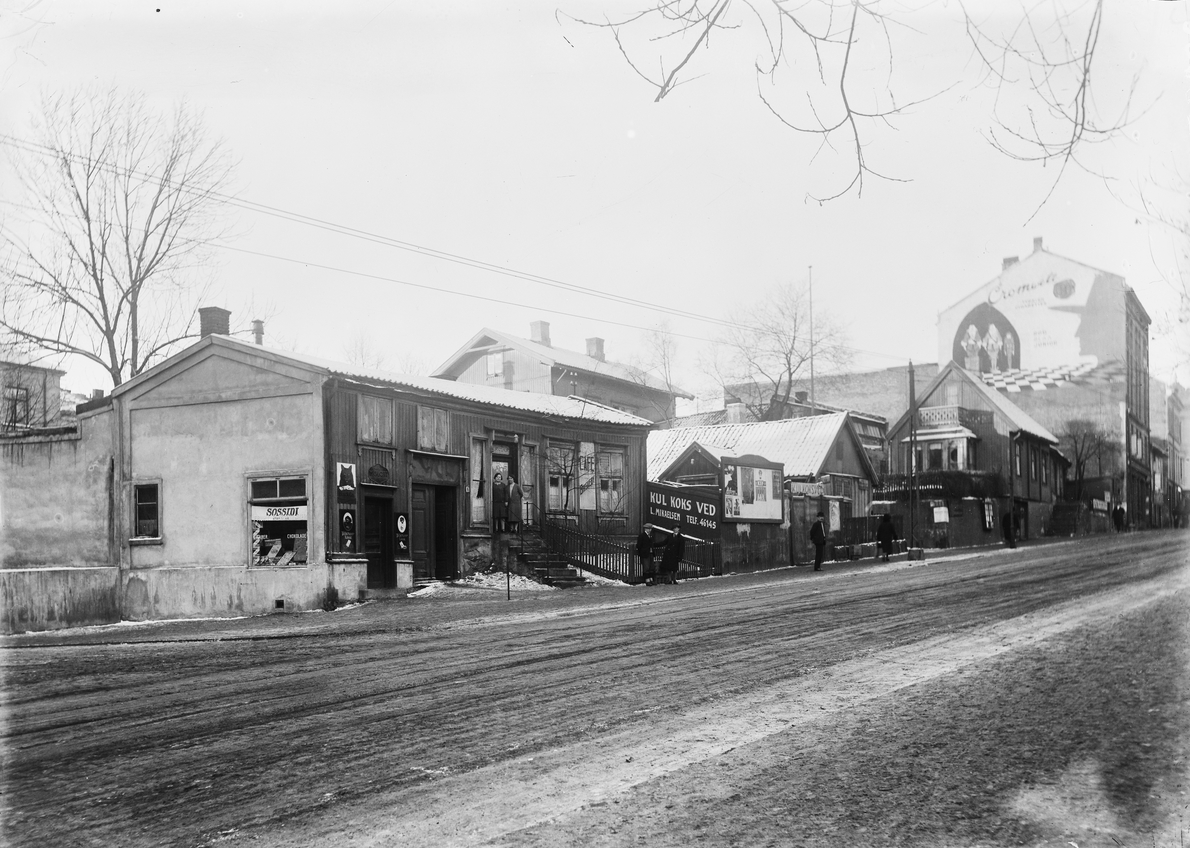 Sørvestsiden av Briskebyveien fra Niels Juels gate og oppover. Vi ser nr. 6 (der Niels Juels gate 70 er nå; revet), 8 (revet), 22 (revet), 24 (revet), 26, 28 (revet) og 30. Foto: Johannes Holmsen, ca. 1929. Fra Byhistorisk samling hos Oslo Museum.